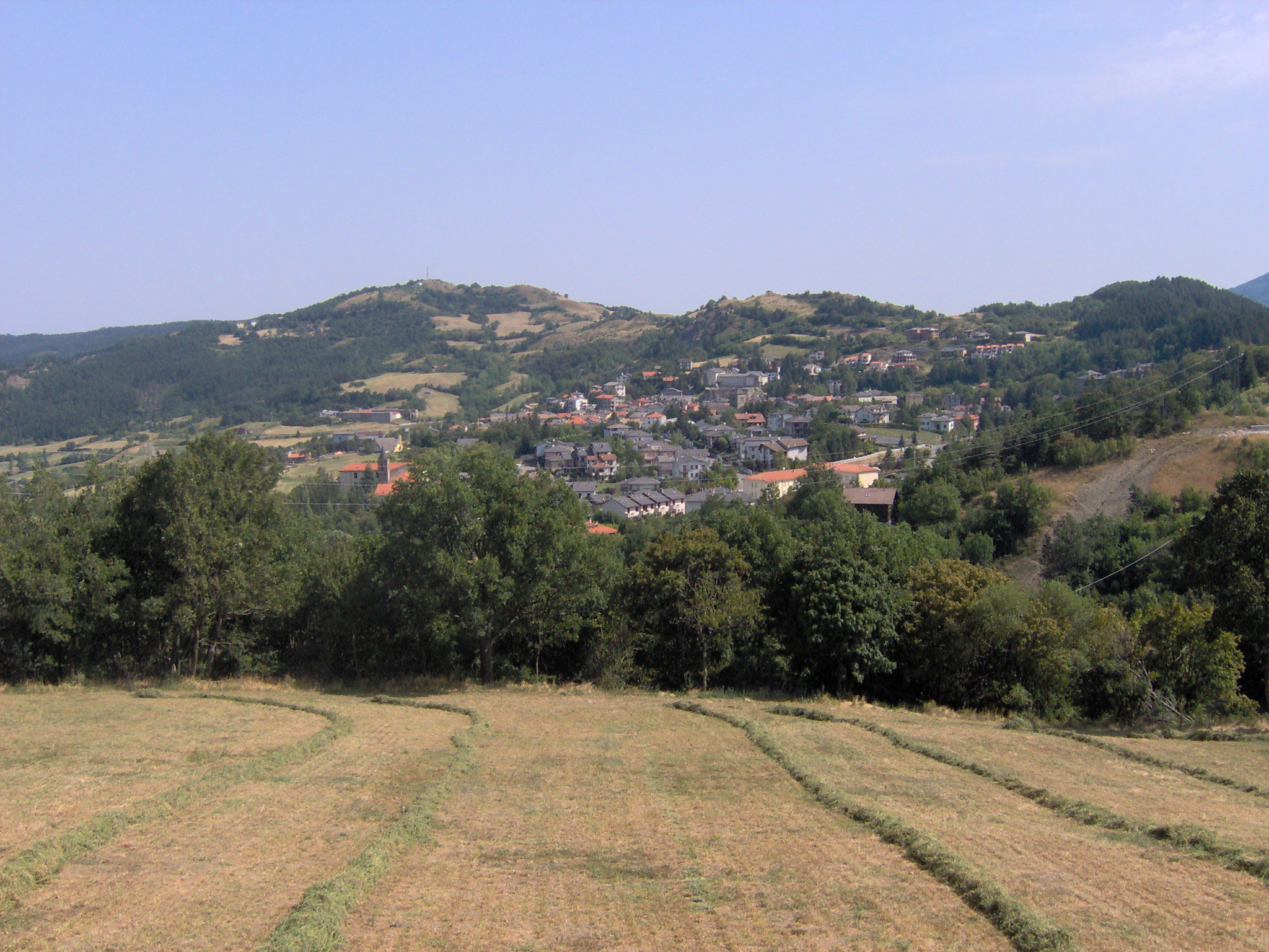 Berceto vista dalla SS.62 della Cisa in località Poggio